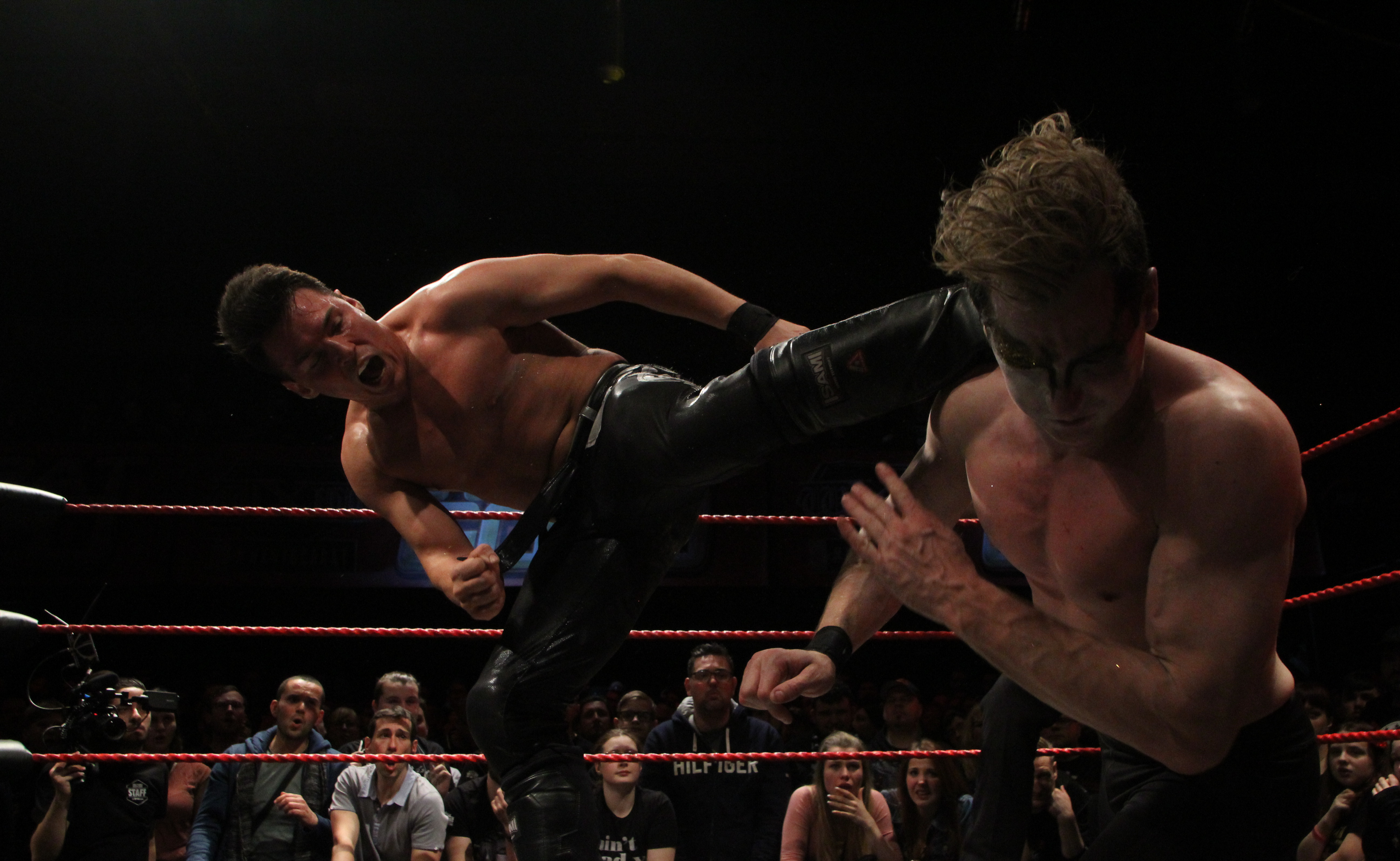 Mike Bailey donnant un coup de pied au visage de Cara Noir en finale du tournoi wXw 16 Carat Gold Tournament.